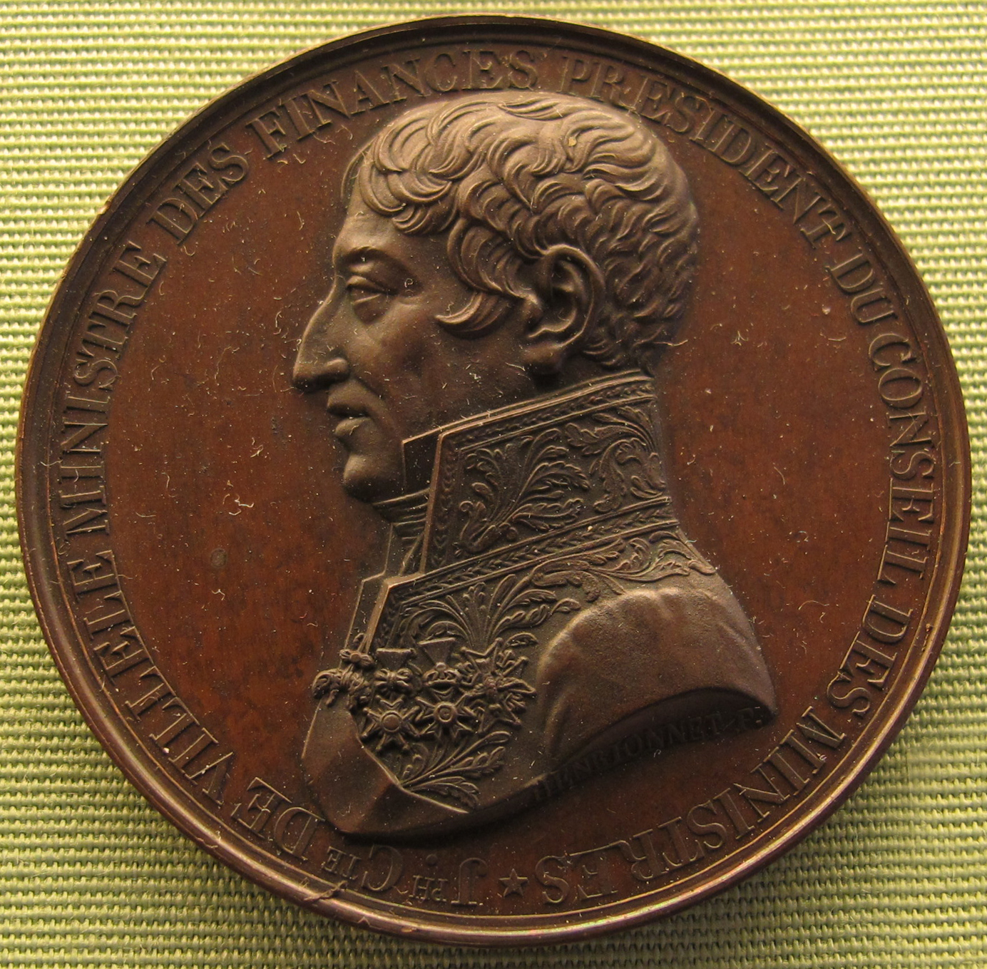 Joseph de Villele (1773-1854), 1825